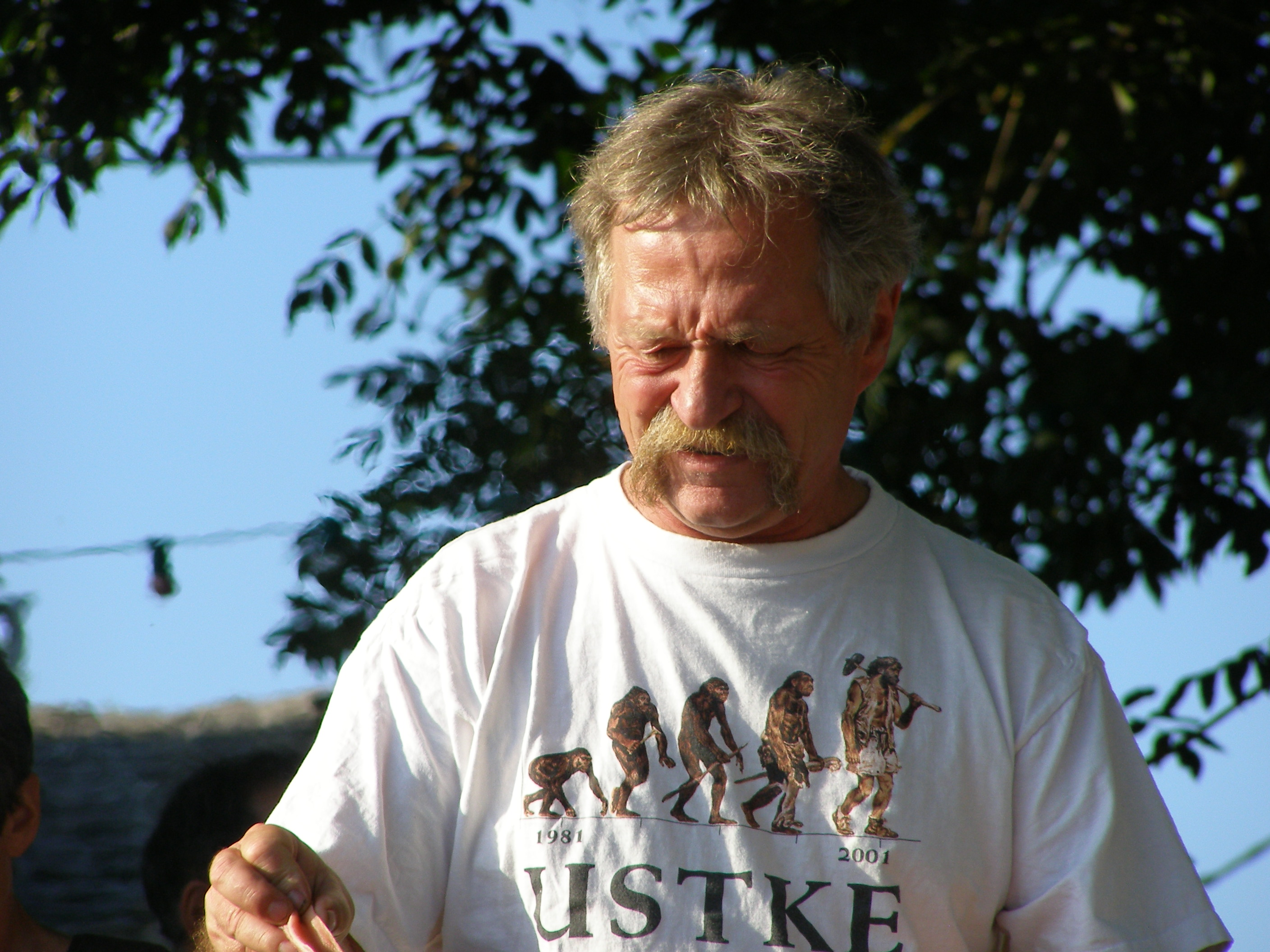 José Bové chez lui à Montredon (La Roque-Sainte-Marguerite, Aveyron, Midi-Pyrénées, France).